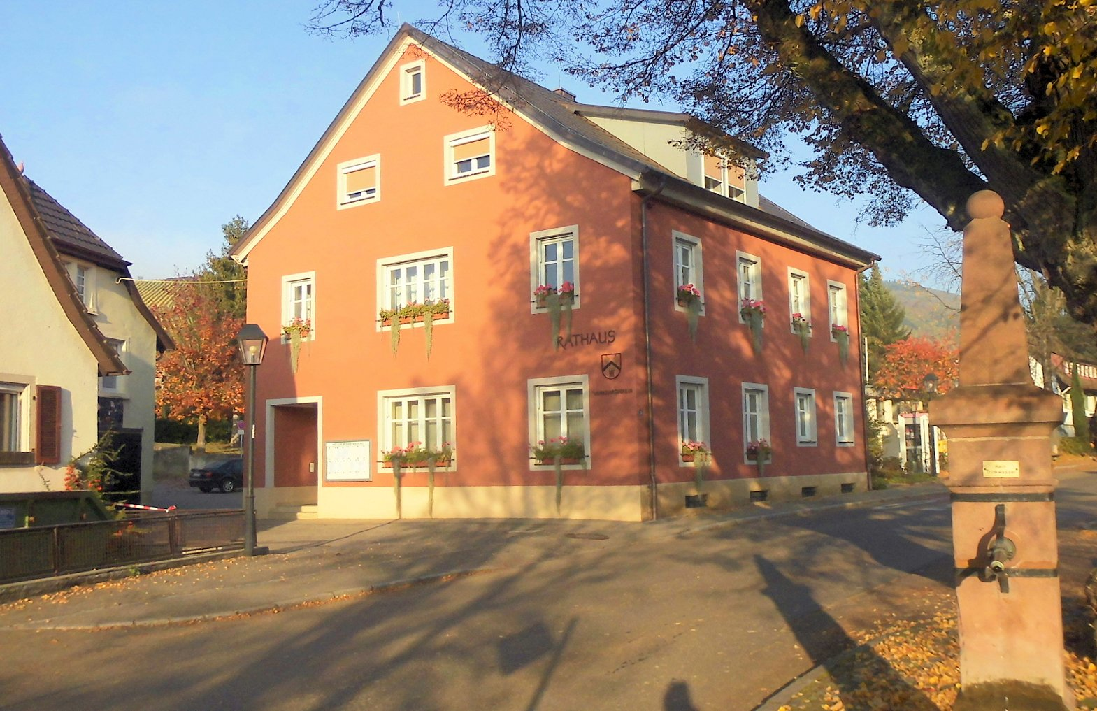 Ehemaliges Rathaus von Niederweiler, Stadt Müllheim, Baden